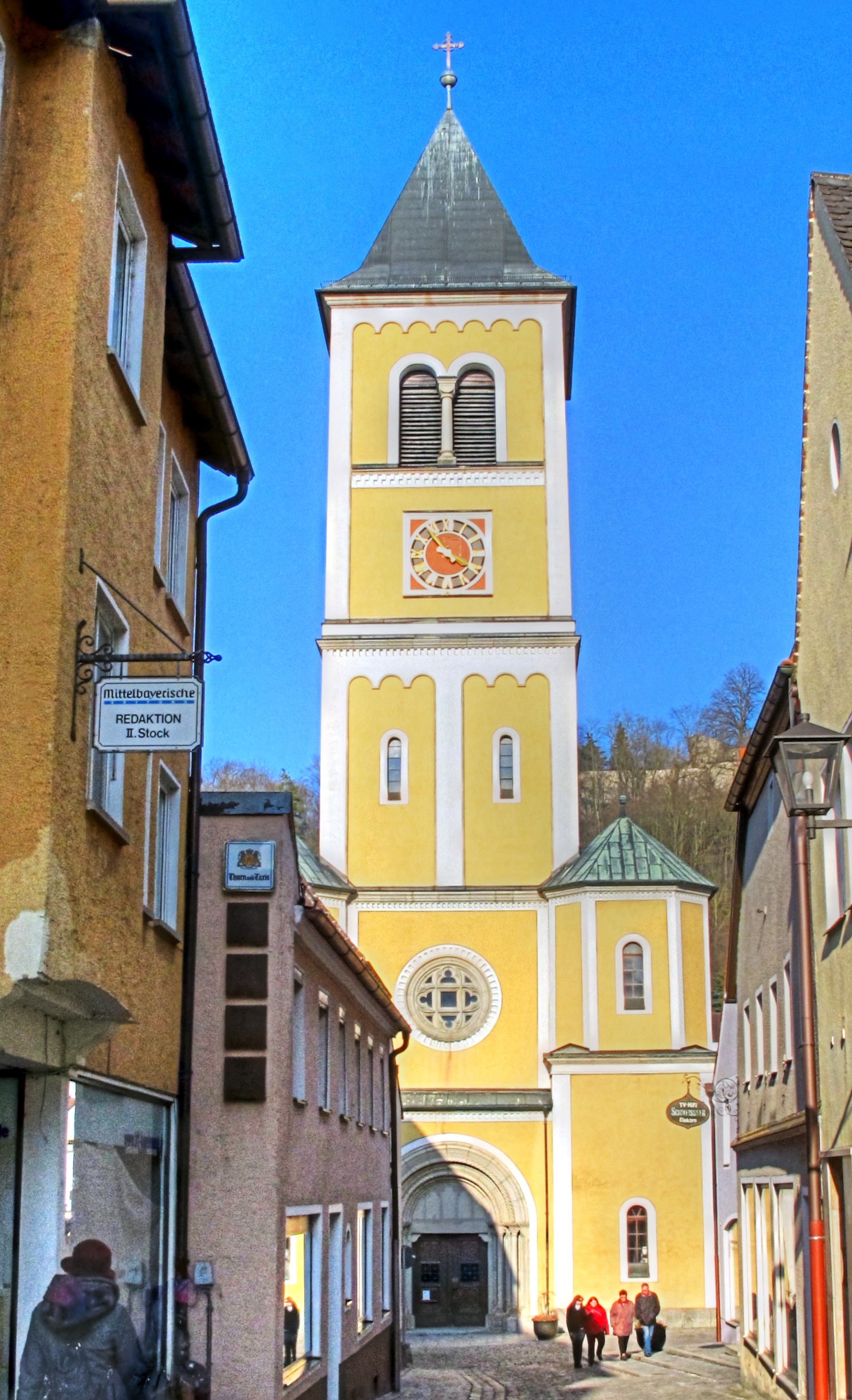 Deutschland, Bayern, Regierungsbezirk Oberpfalz, Gemeinde Burglengenfeld, Stadtpfarrkirche St. Vitus